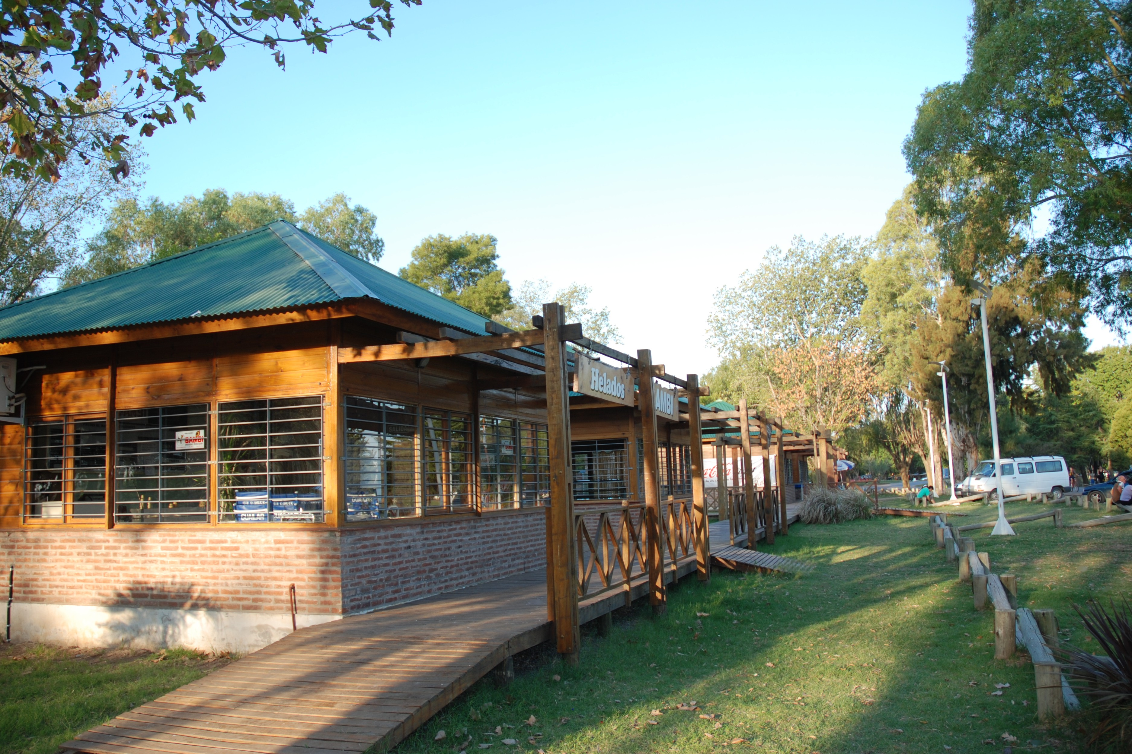 Centro de compras ubicado en el Paseo de los Navegantes, en el Parque Natural Laguna de Gómez, Junín, Argentina.